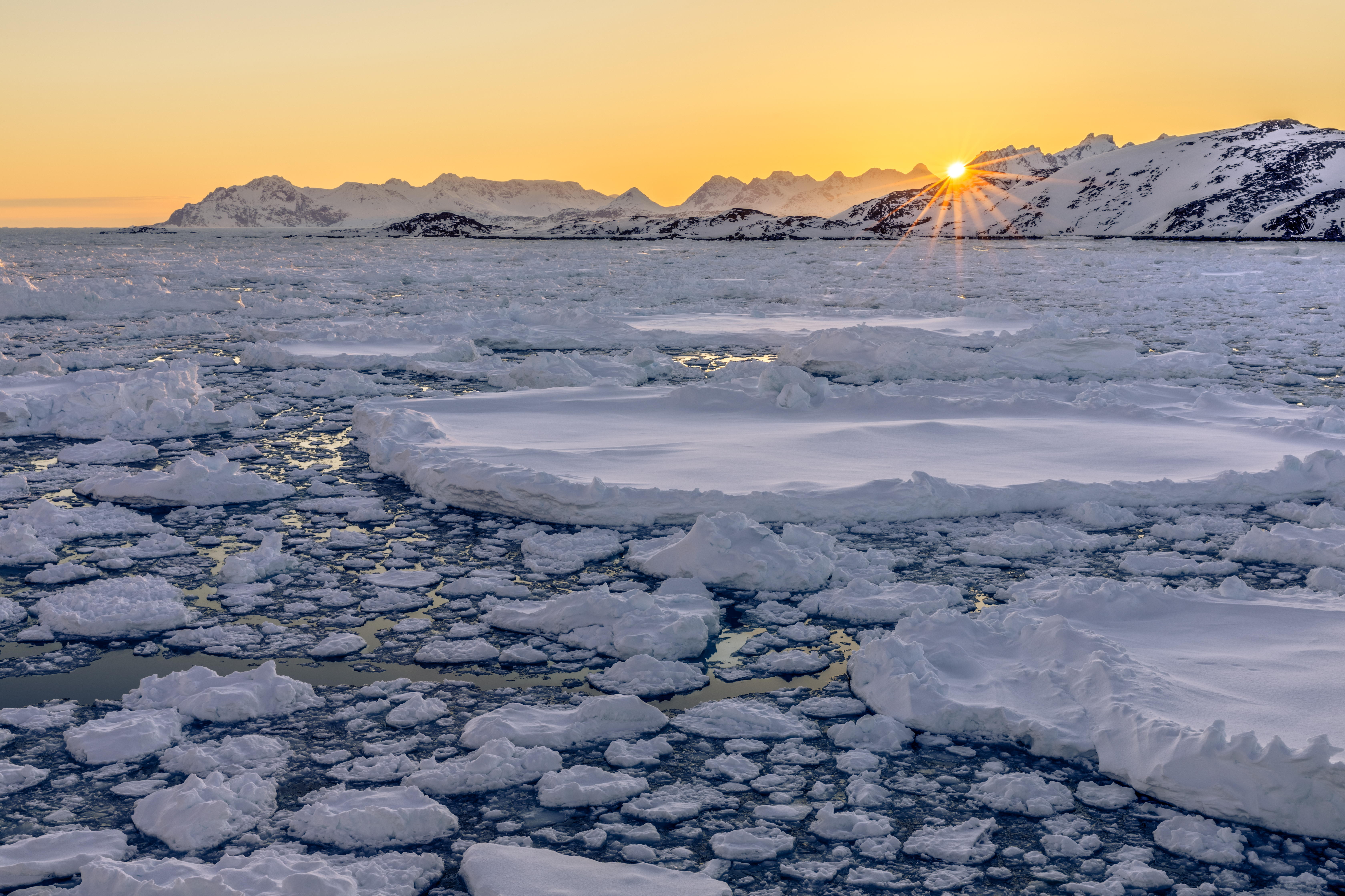 Pack ice in Kulusuk Bay - Greenland